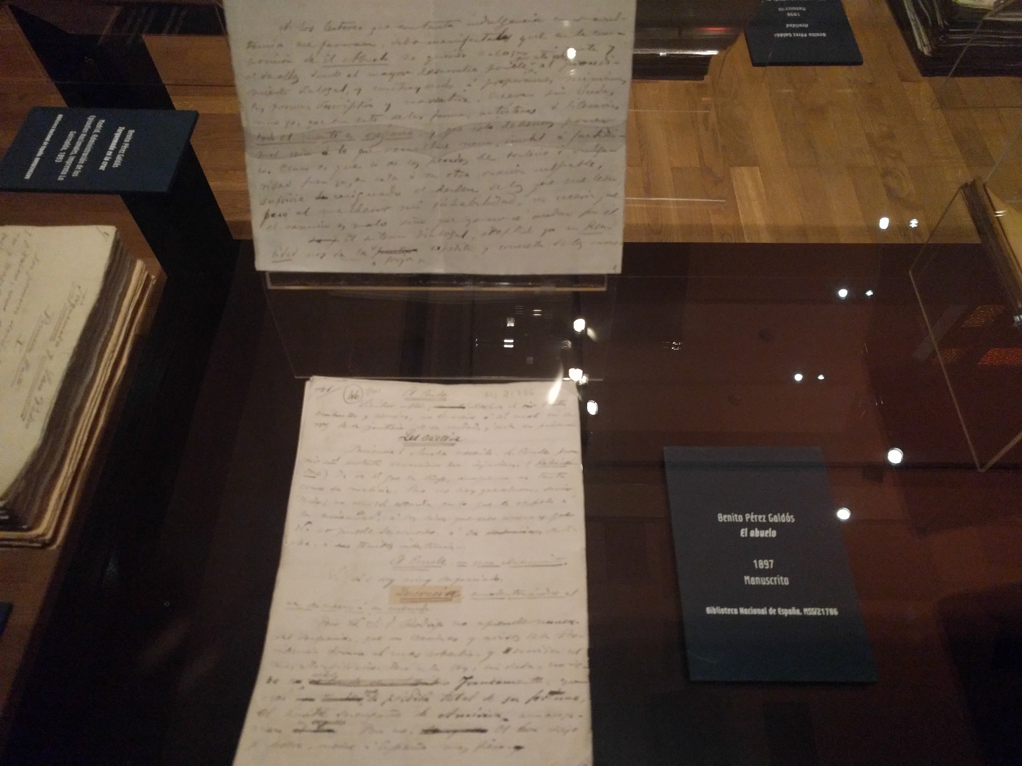 Manuscrito de El abuelo (novela) de Benito Pérez Galdós, 1897. Biblioteca Nacional de España.